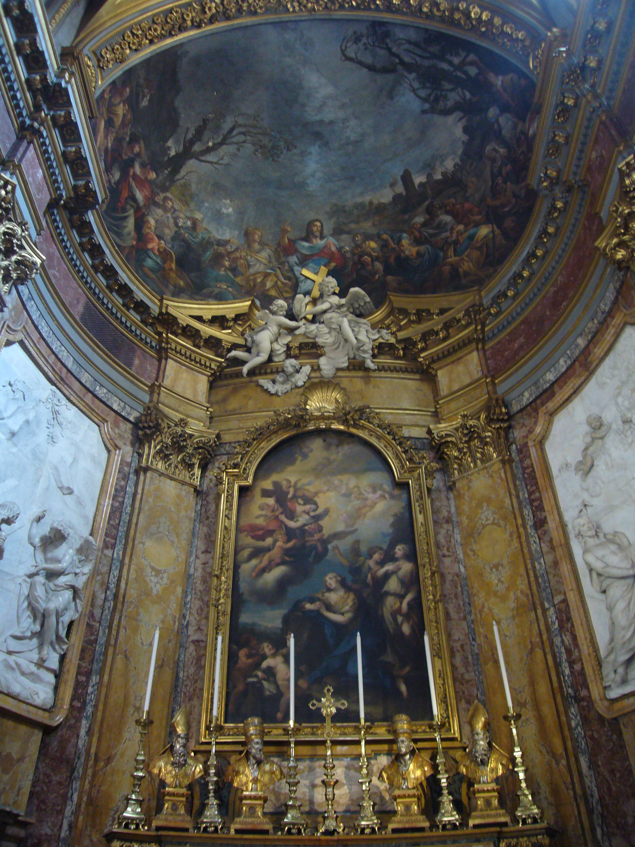 Roma, Santa Maria Maddalena - altar maggiore